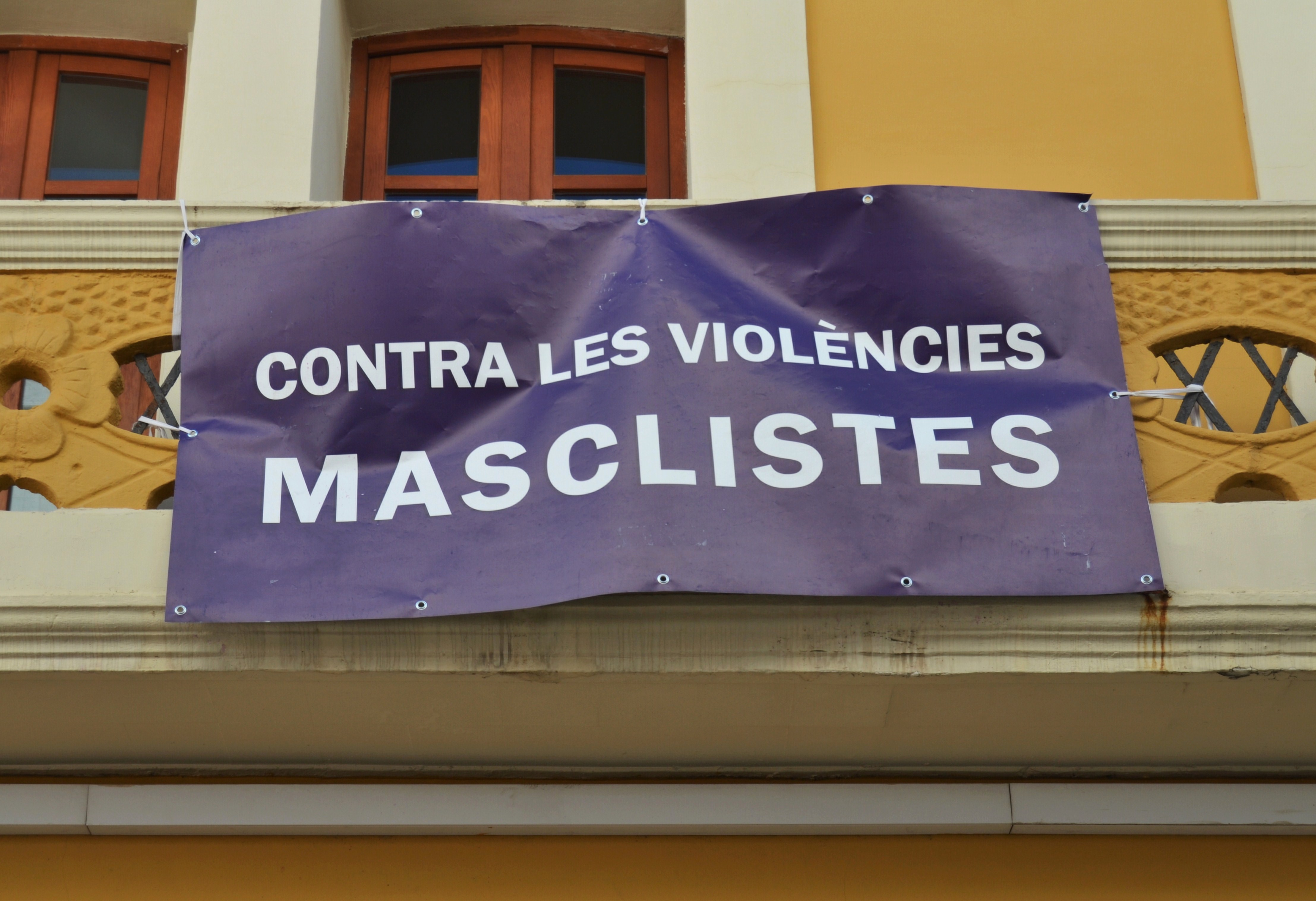 Pancarta contra les violències masclistes a l'ajuntament, Gata de Gorgos.